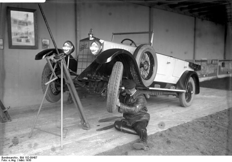 Ene interessante Hebevorrichtung für Personen-Automobile! Diese moderne Kippvorrichtung hebt das Auto in wenigen Sekunden und kann von einem Mann mit Leichtigkeit bedient werden. Die Kippvorrichtung ist zusammenlegbar und leicht transportabel.